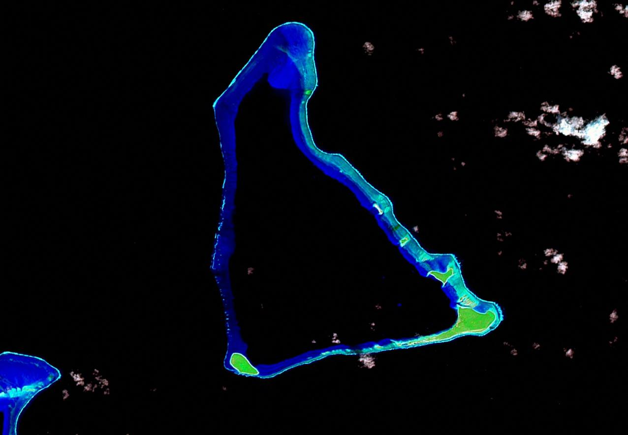 Utirik Atoll - Landsat N-59-10- 2000 Image